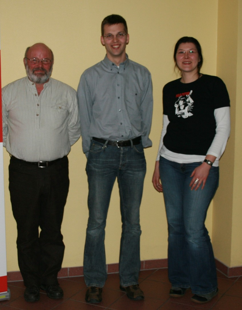 Der Vorstand des Arbeitskreises zentraler Jugendverbände e.V. im Juli 2011 (v.l.n.r Uwe Tiemann, Markus Berens, Jessica Füllbeck)